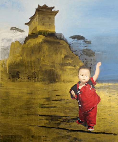 Cuadro perteneciente a la exposición Un cuento chino de Juan Vida